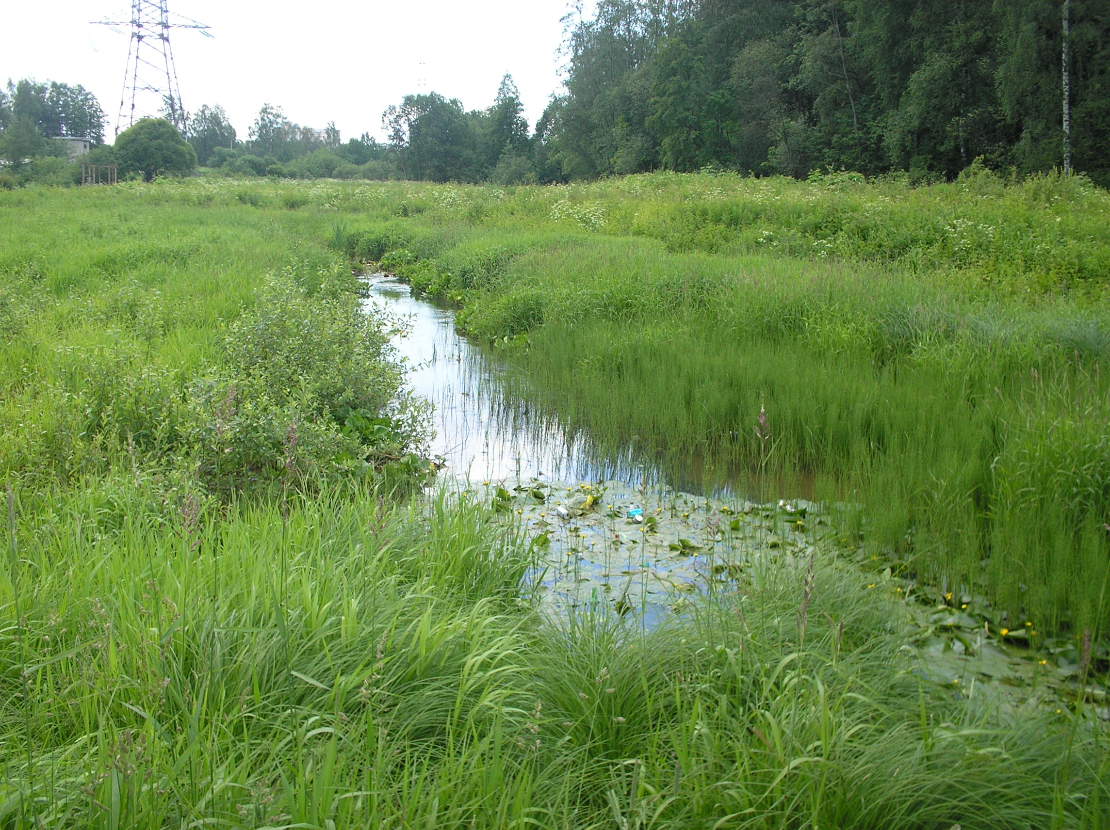 Река Старожиловка